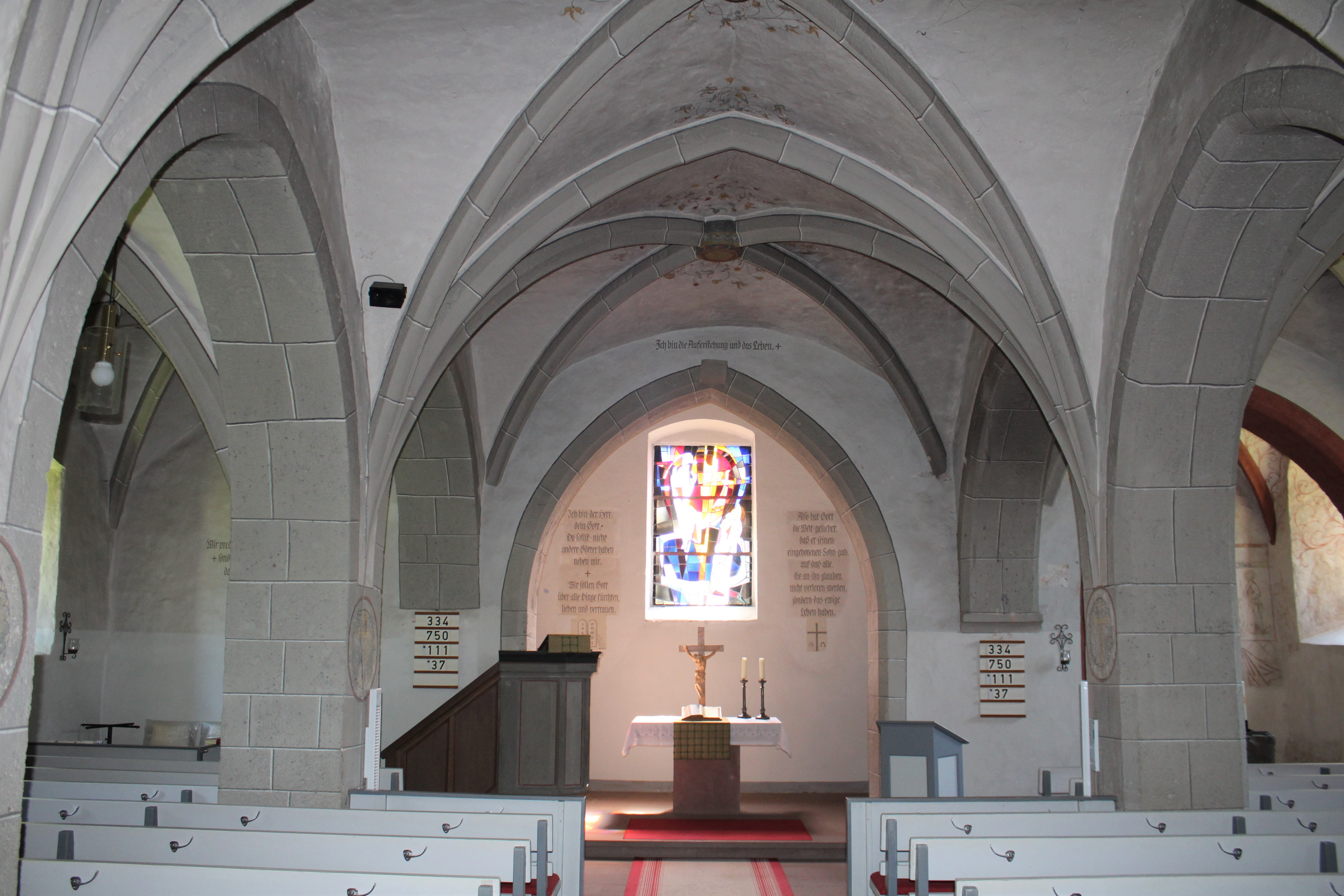 Evangelische Kirche Münster, Laubach, Landkreis Gießen, Hessen, Deutschland